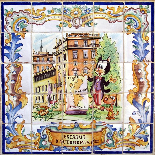 Rajoleta de Pumbi al Parc Temàtic d'Història Valenciana de Manises